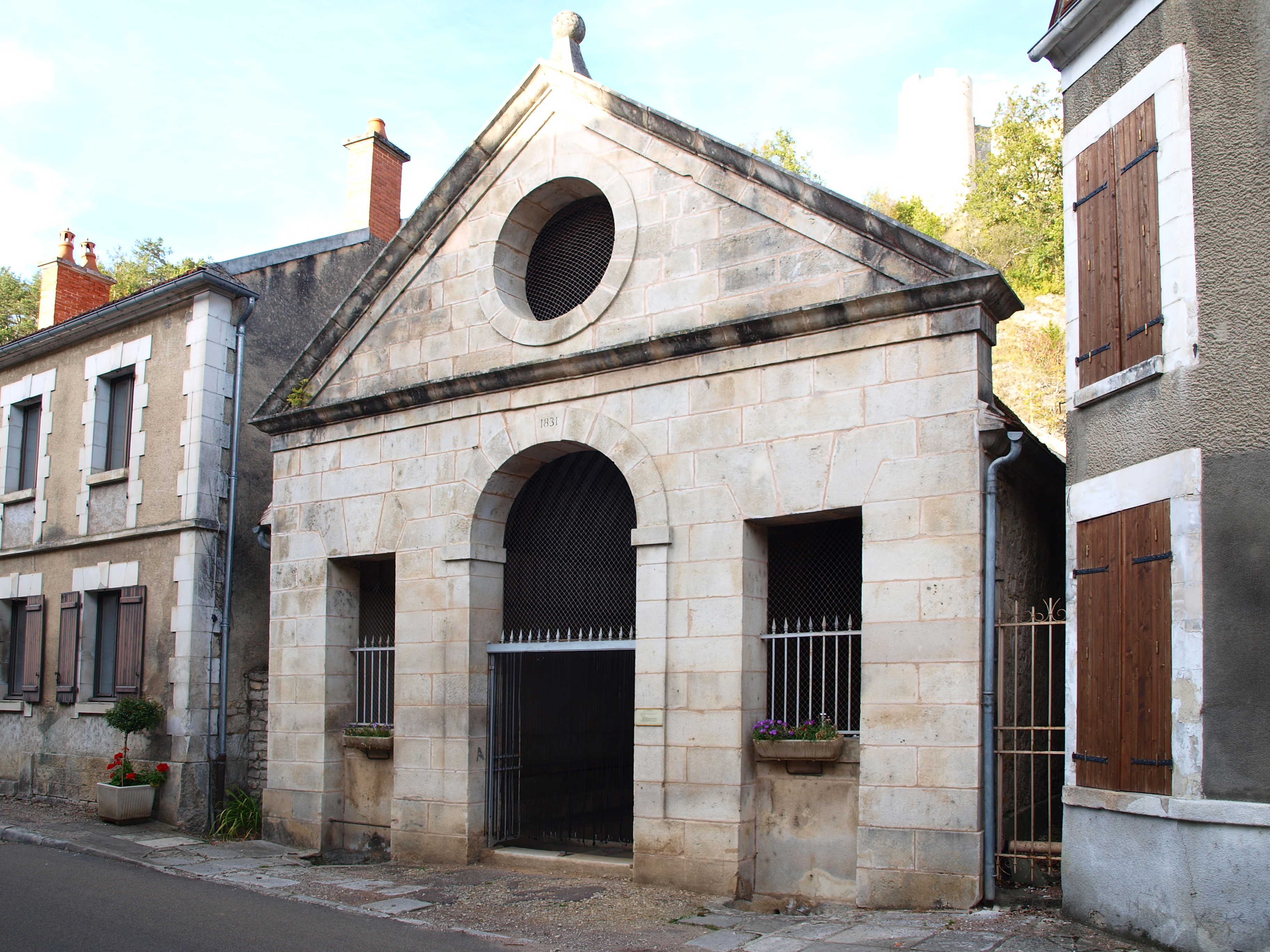 Druyes-les-Belles-Fontaines (Yonne, France) ; le lavoir